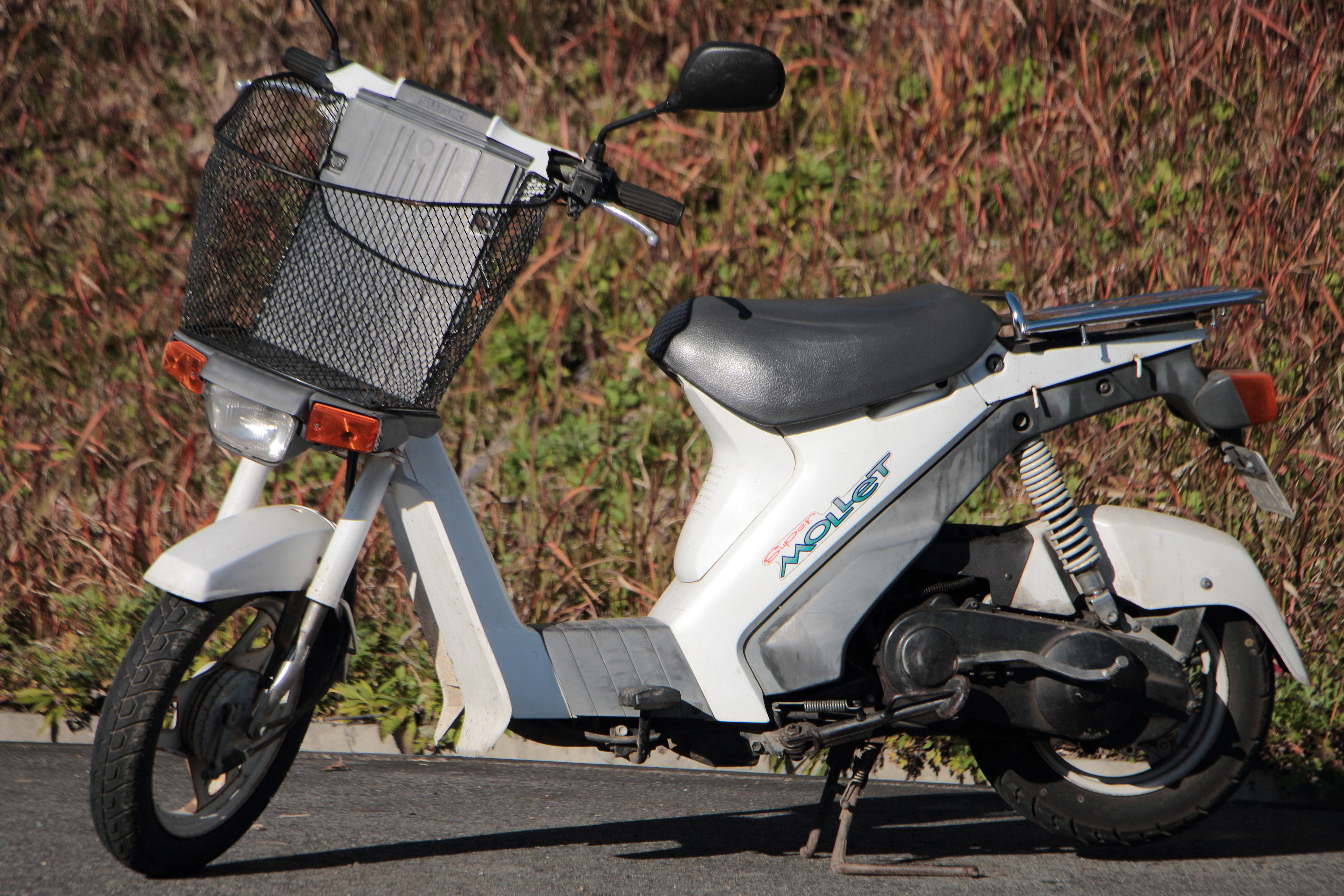 スズキ・FA14Bスーパーモレ(2018年12月8日、美作市内)